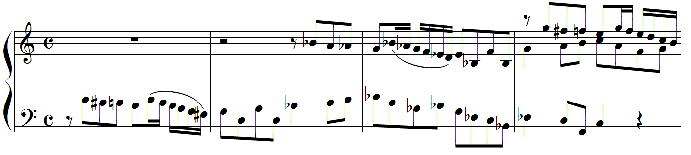 Anton Reicha - sujet de la fugue n°23 des 36 fugues, op.36